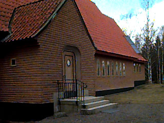 Björneborgs kyrka exteriör. Foto Mats Ernvik, 1997.